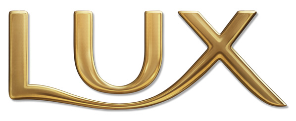 Lux Logo